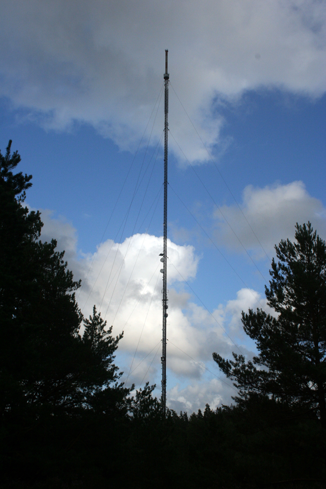 TV-masten i Herrestad sett från Herrestadsfjället.